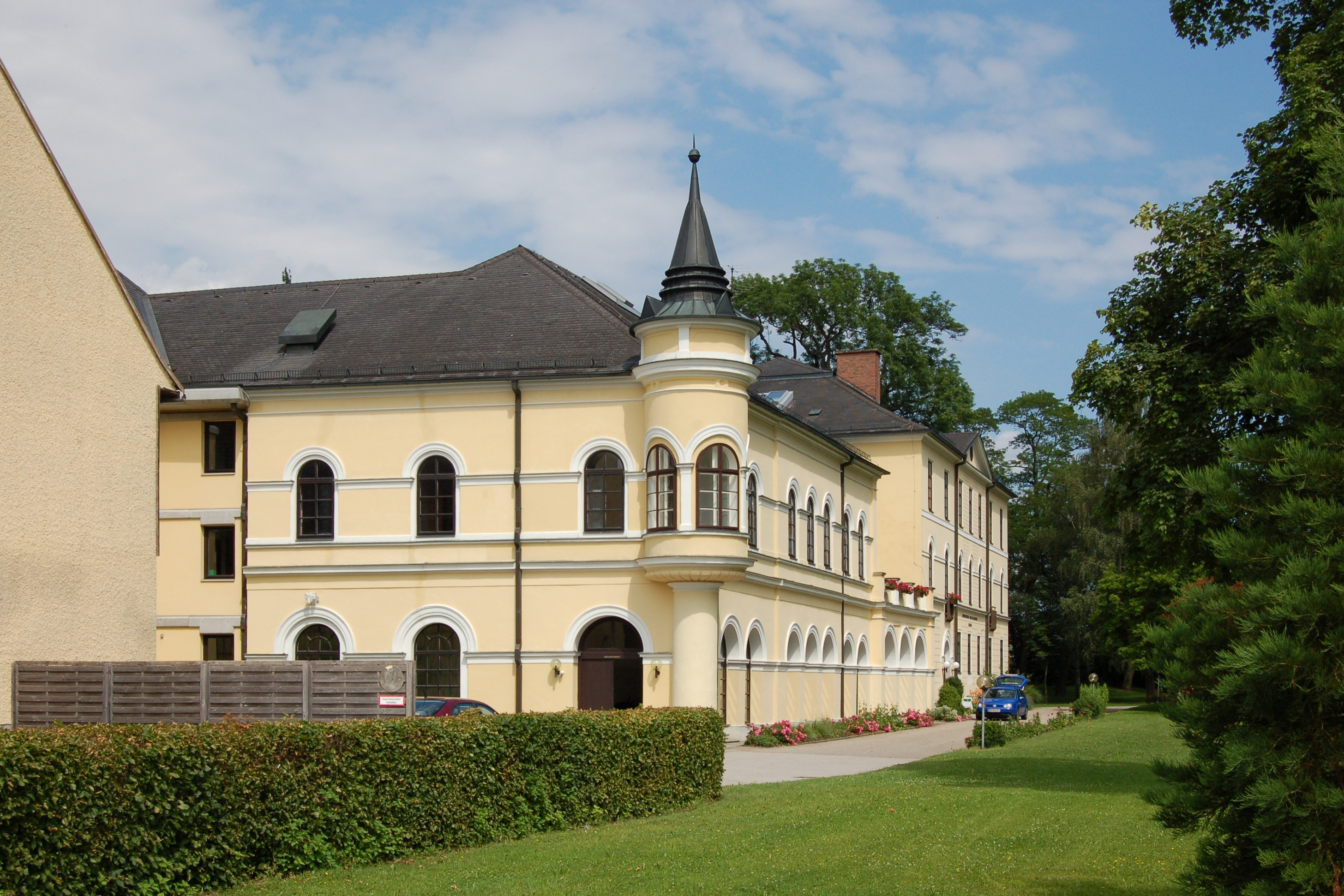 Das Schloss Bergheim ist eine unregelmäßige, mehrflügelige Schlossanlage in weitläufiger Parklandschaft. Die ältesten Bauteile stammen aus dem 15. Jahrhundert, wobei das Schloss laufend erweitert wurde.